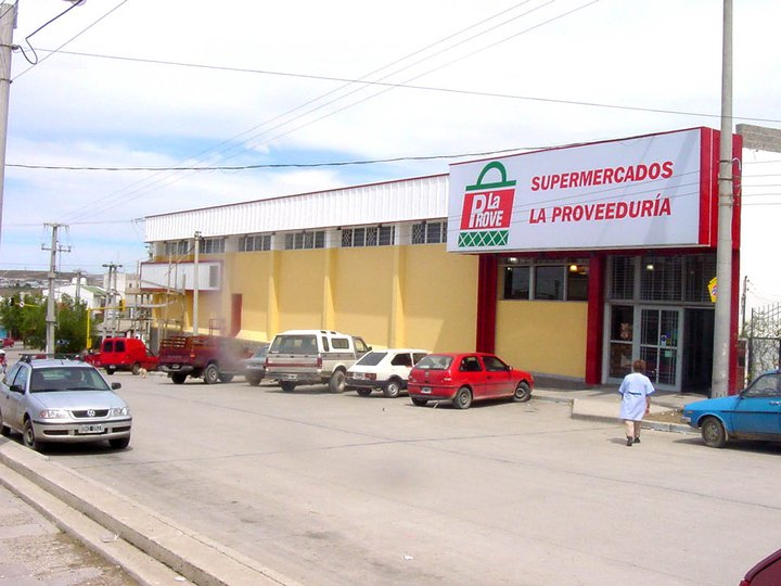 martin fierro y kennedy